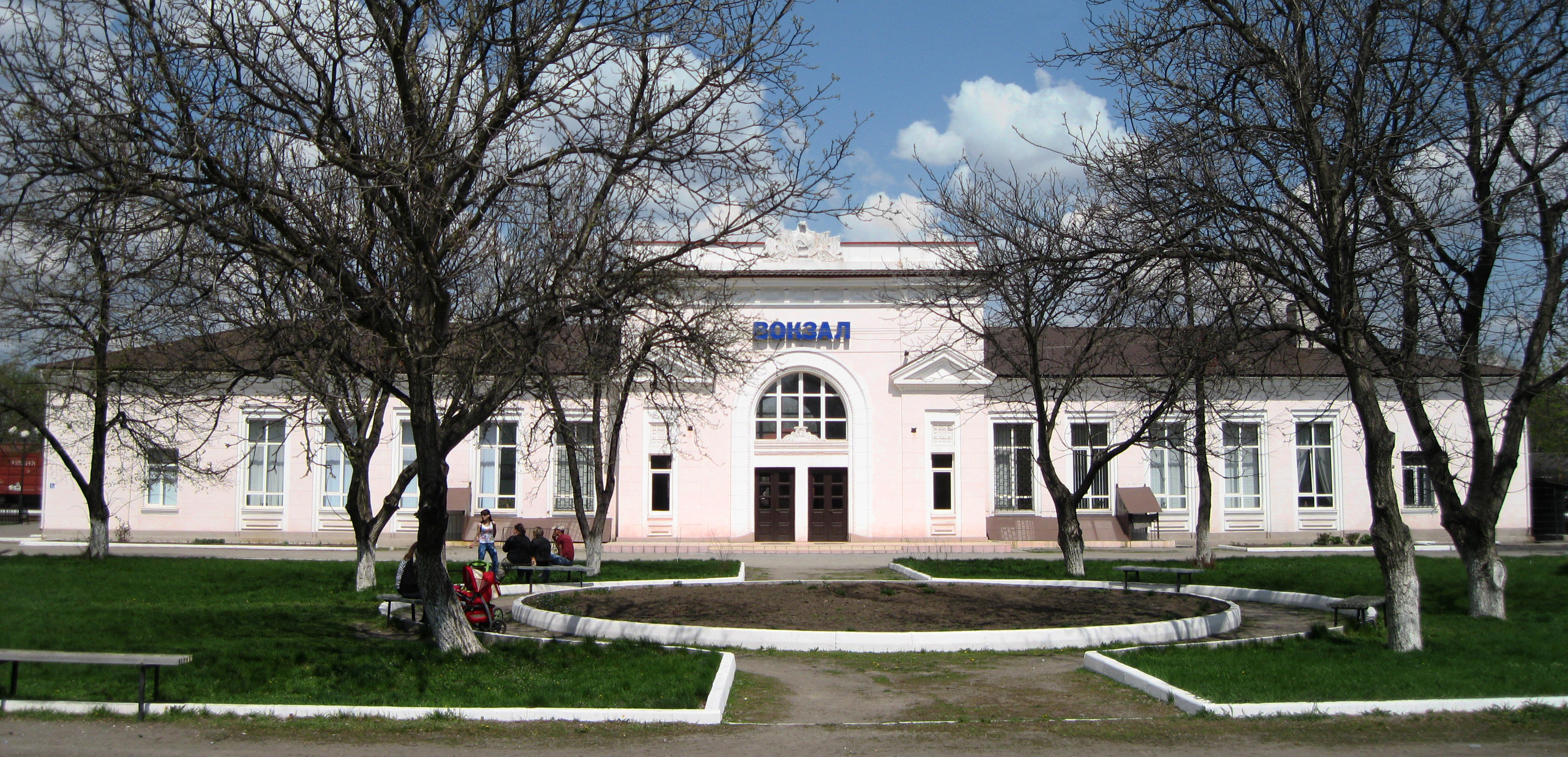 Вокзал станції Користівка: Вигляд вокзалу станції Користівка з боку селища.